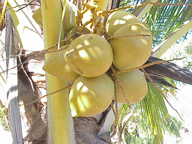 Species: Cocos nucifera Family: Arecaceae Image No. 9